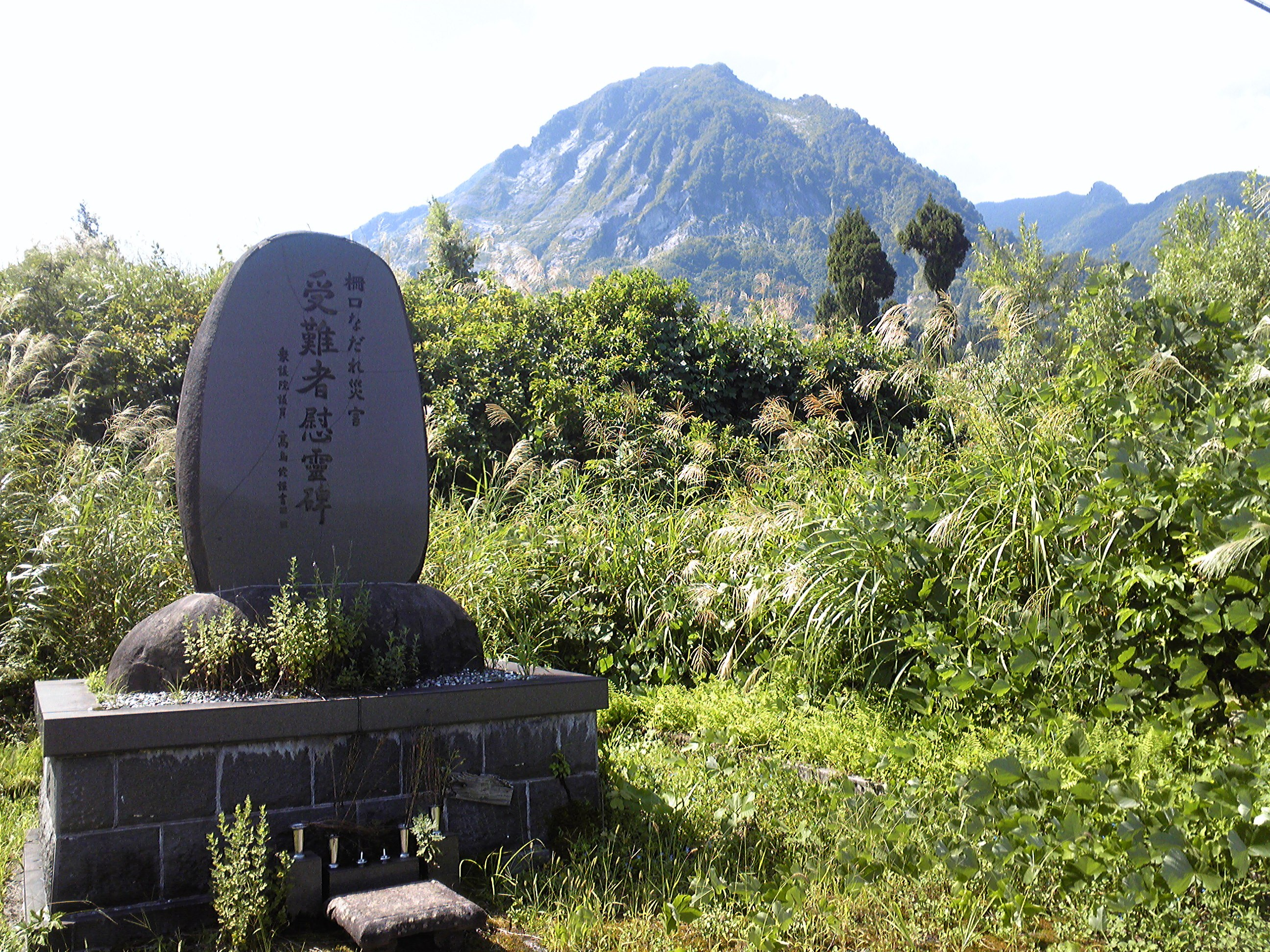 柵口雪崩災害。慰霊碑と権現岳。